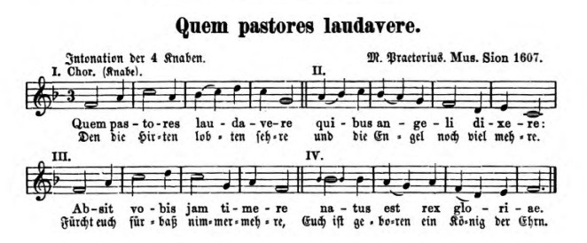 Hymnus in natale Domini Quem pastores laudavere